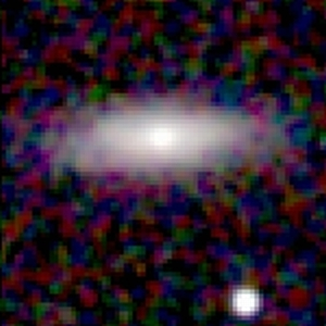 Galaxy NGC 54